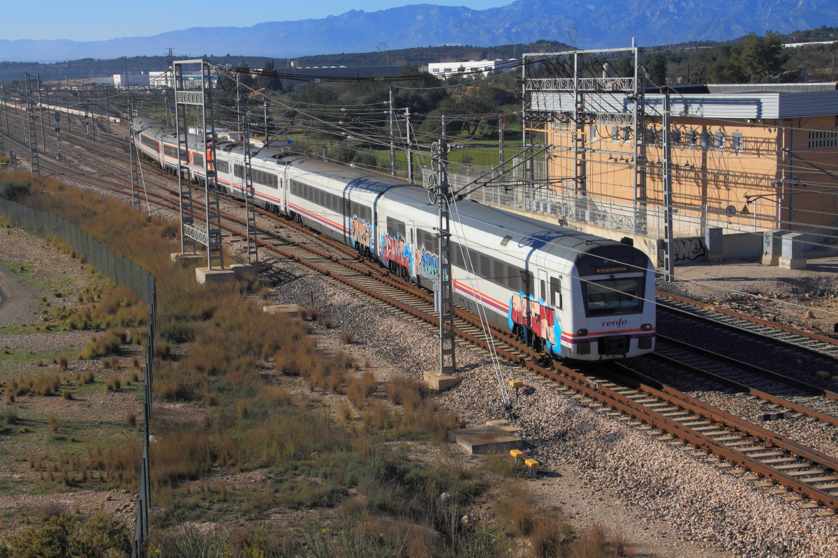 Un doble automotor eléctrico de la serie 448 de Renfe Operadora, en mando múltiple, que realiza el servicio Regional Exprés Tortosa - Barcelona Estació de França, llegando a la estación de L'Aldea - Amposta - Tortosa (Baix Ebre, Tarragona, Catalunya).